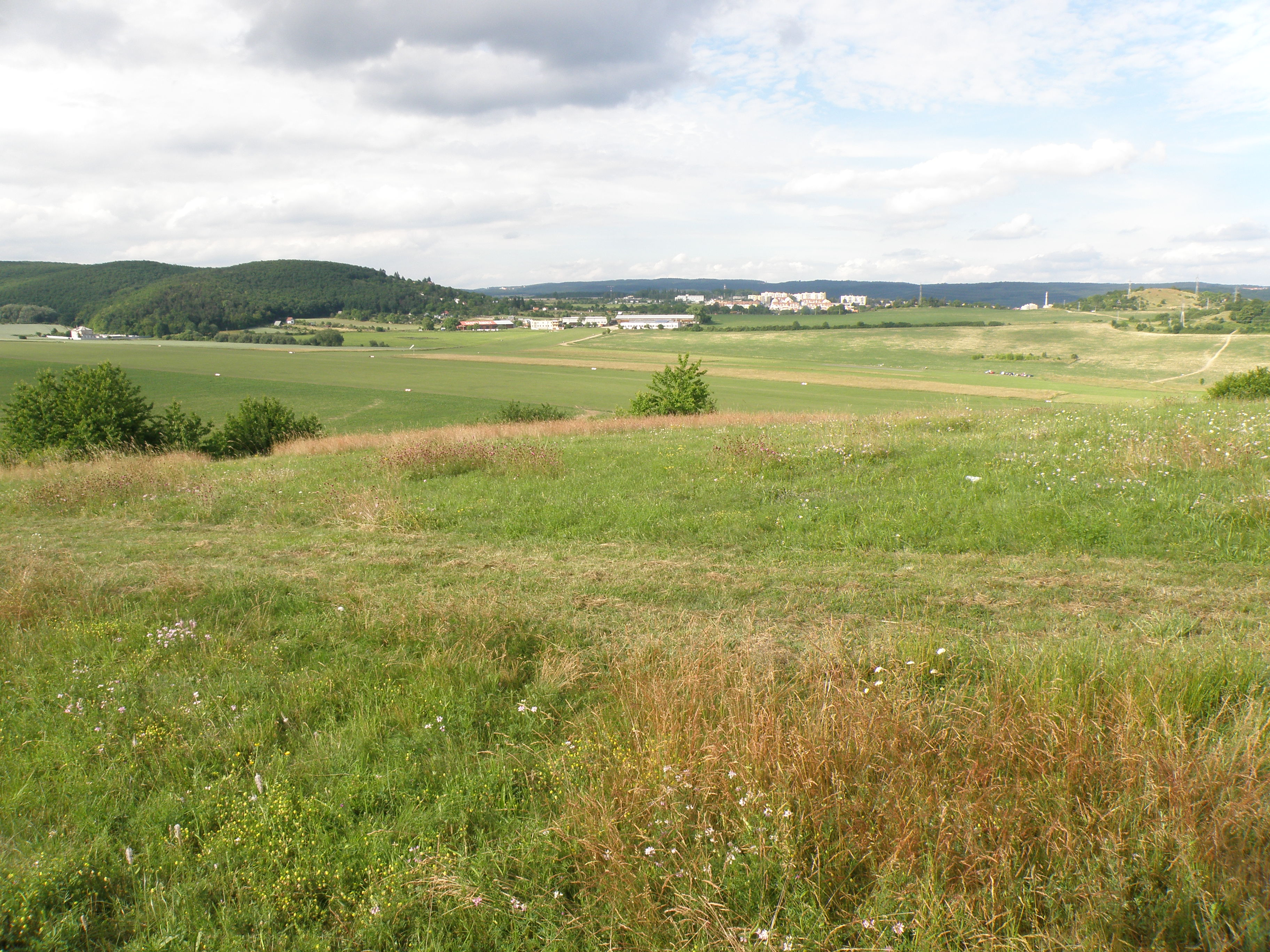 Rozhled z horní travnaté části Netopýrek. Nalevo vedoucí pěšina na snímku pokračuje severoseverovýchodním směrem dolů ze svahu, napravo brzy končí vstupem na oplocený pozemek, který ohraničuje rezervaci z jihu. Uprostřed snímku je komplex budov letiště Medlánky, před nimiž se rozkládá letištní plocha. Pozadí za letištěm tvoří brněnská část Medlánky, vlevo je lemována zalesněným vrcholem Bosně, vpravo je Medlánecký kopec, součást přírodní památky Medlánecké kopce.